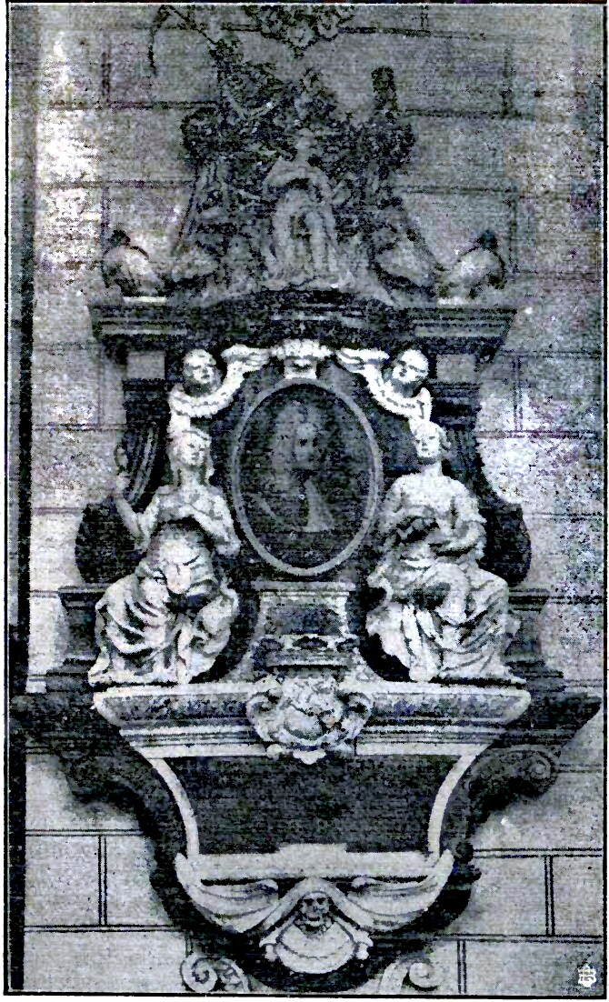 Epitaphium für Bürgermeister J. M. Tesdorpf in der Marienkirche.